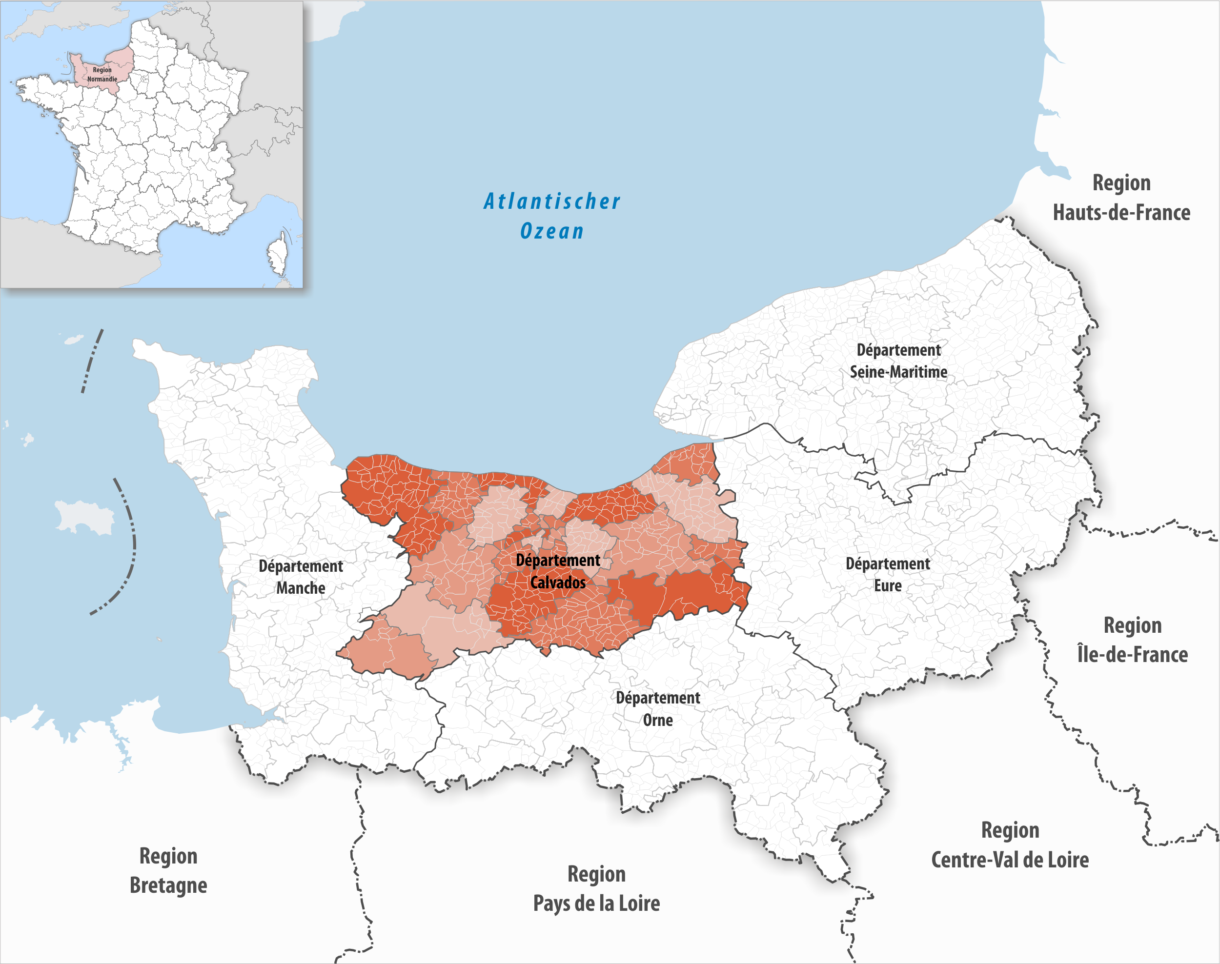 Lage des Departements Calvados